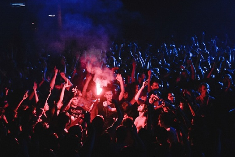 Концерт Lumen в Москве 27 ноября 2011